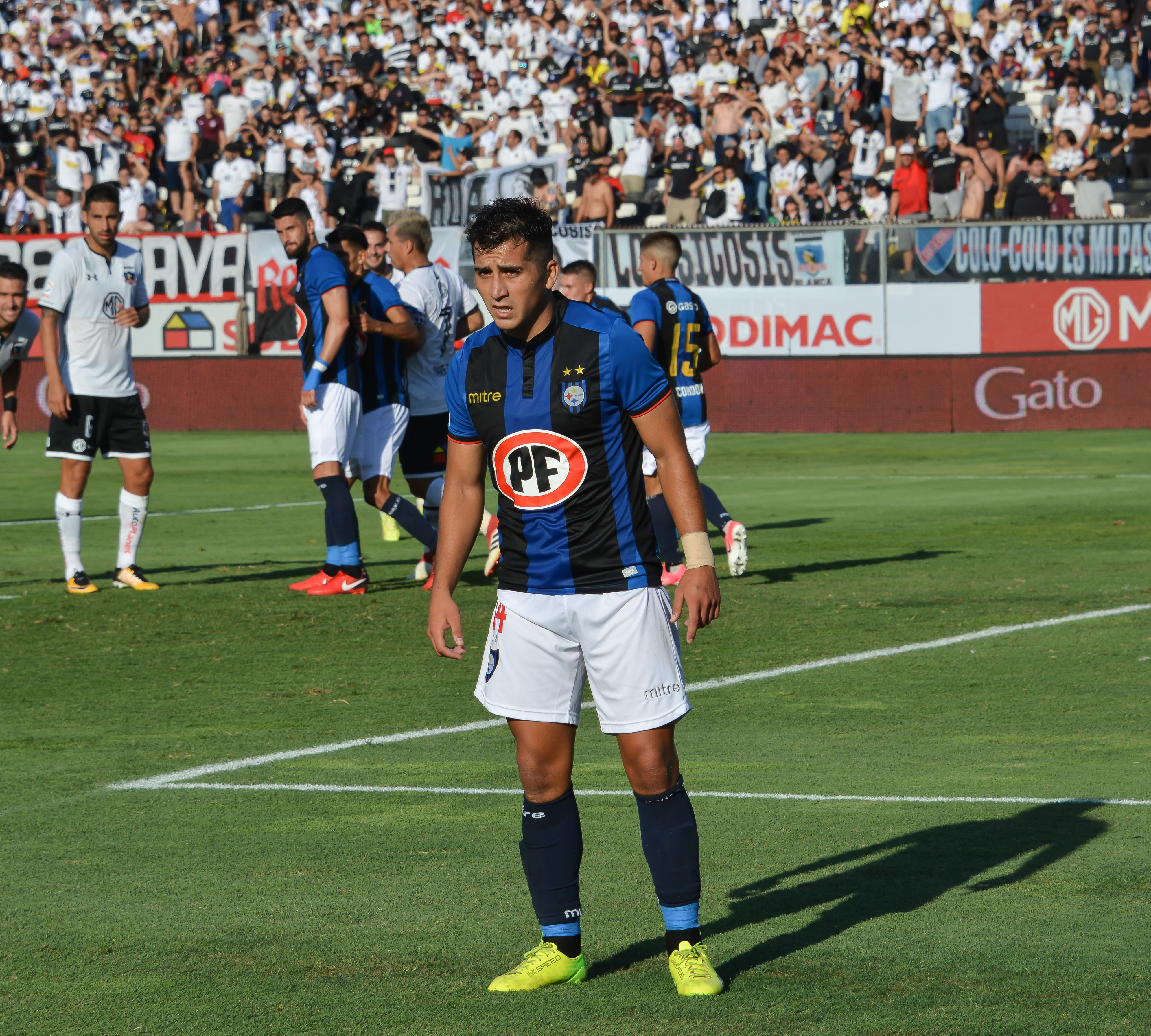 Claudio Jopia, Colo Colo v Huachipato, Estadio Monumental, Santiago, Chile.